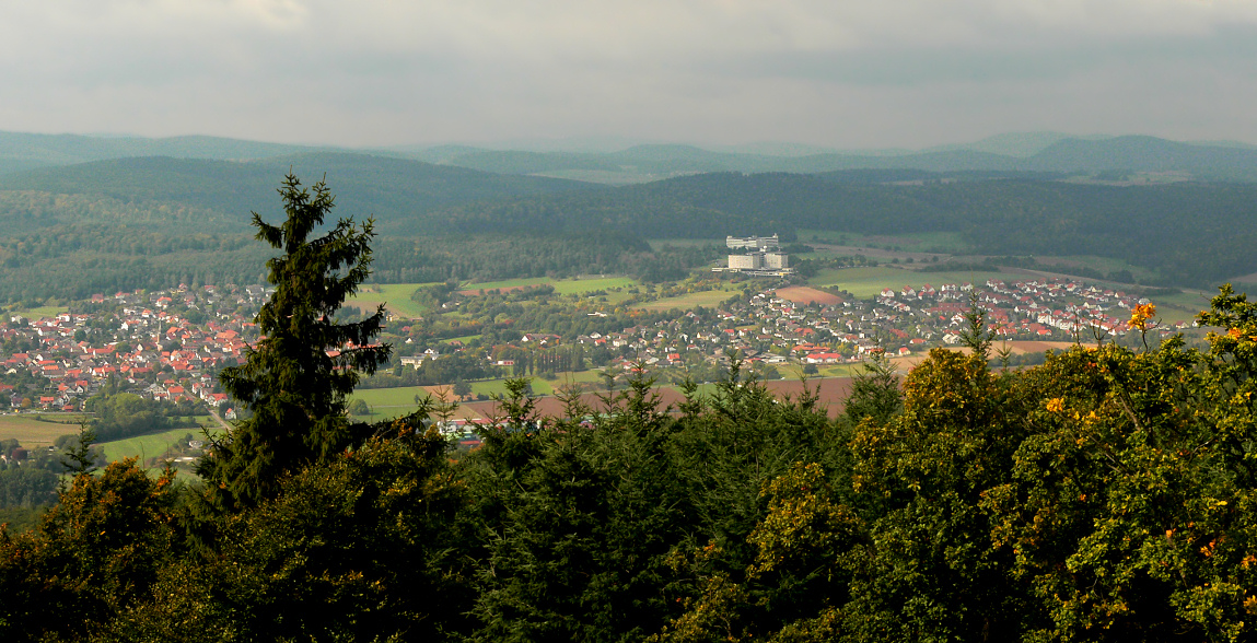 Bad_Zwesten